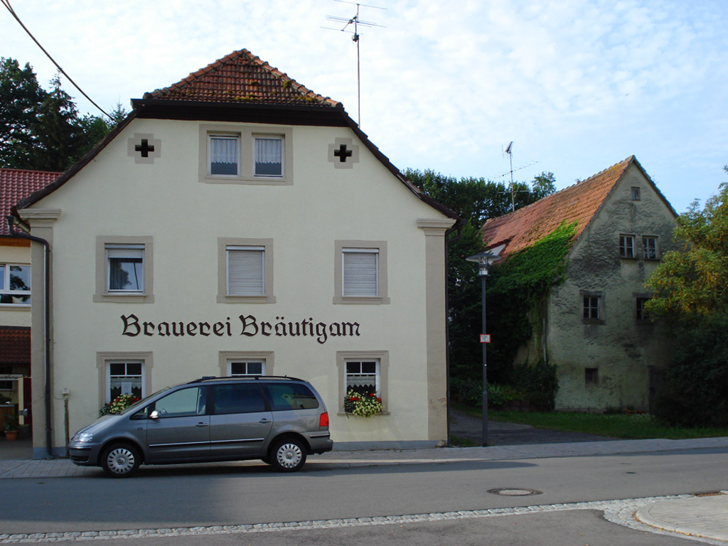 Weisbrunn, Stadt Eltmann, Kreis Haßberge, Bayern